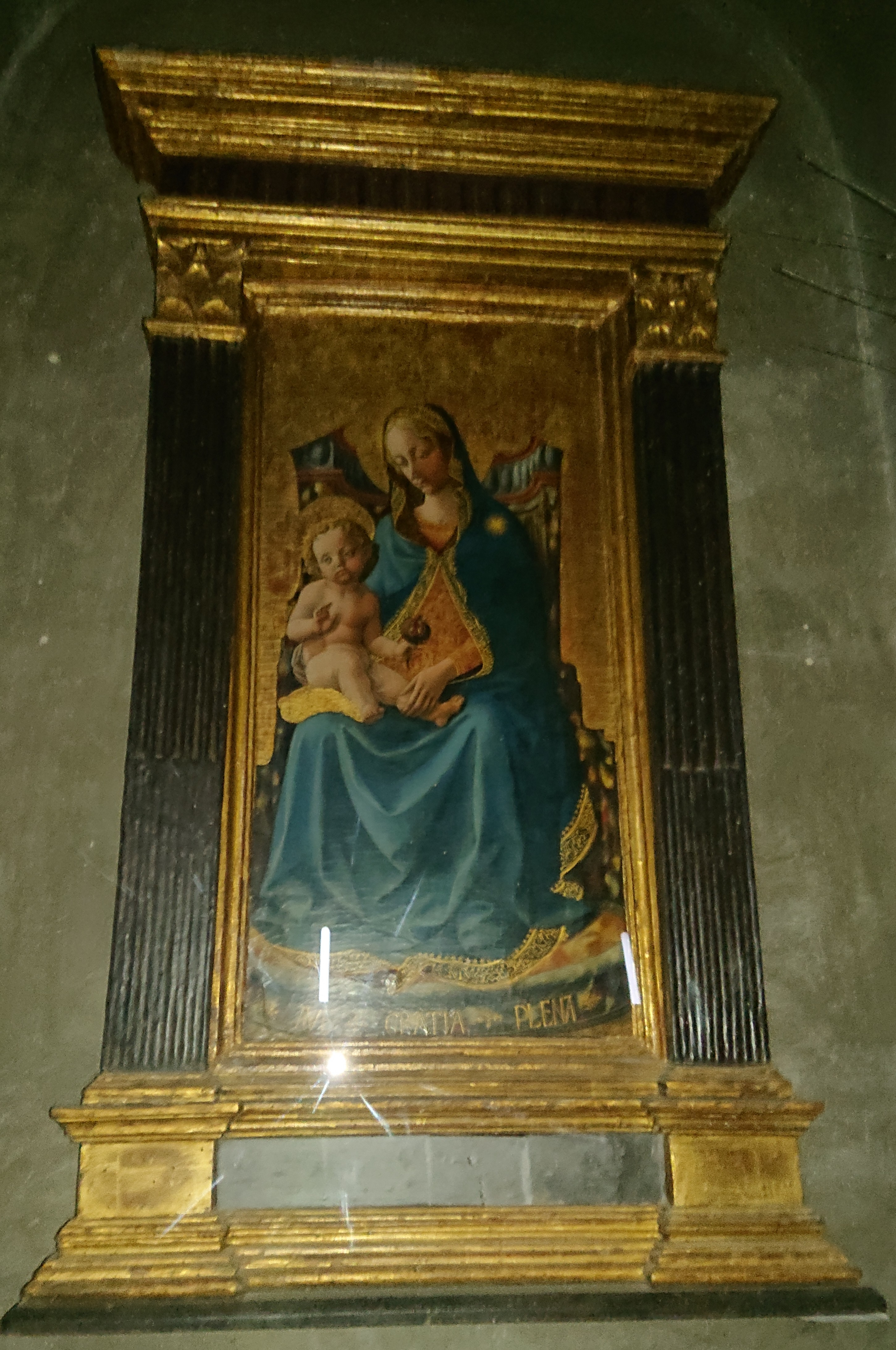 Tempera su tavola attribuita a Francesco di Stefano, detto Il Pesellino (Firenze 1422-1457. Presente nella Chiesa di San Michele Arcangelo a Cetica. La Vergine sul trono sorregge sul ginocchio destro un cuscino dove è seduto il Bambino che tiene in mano una melagrana.